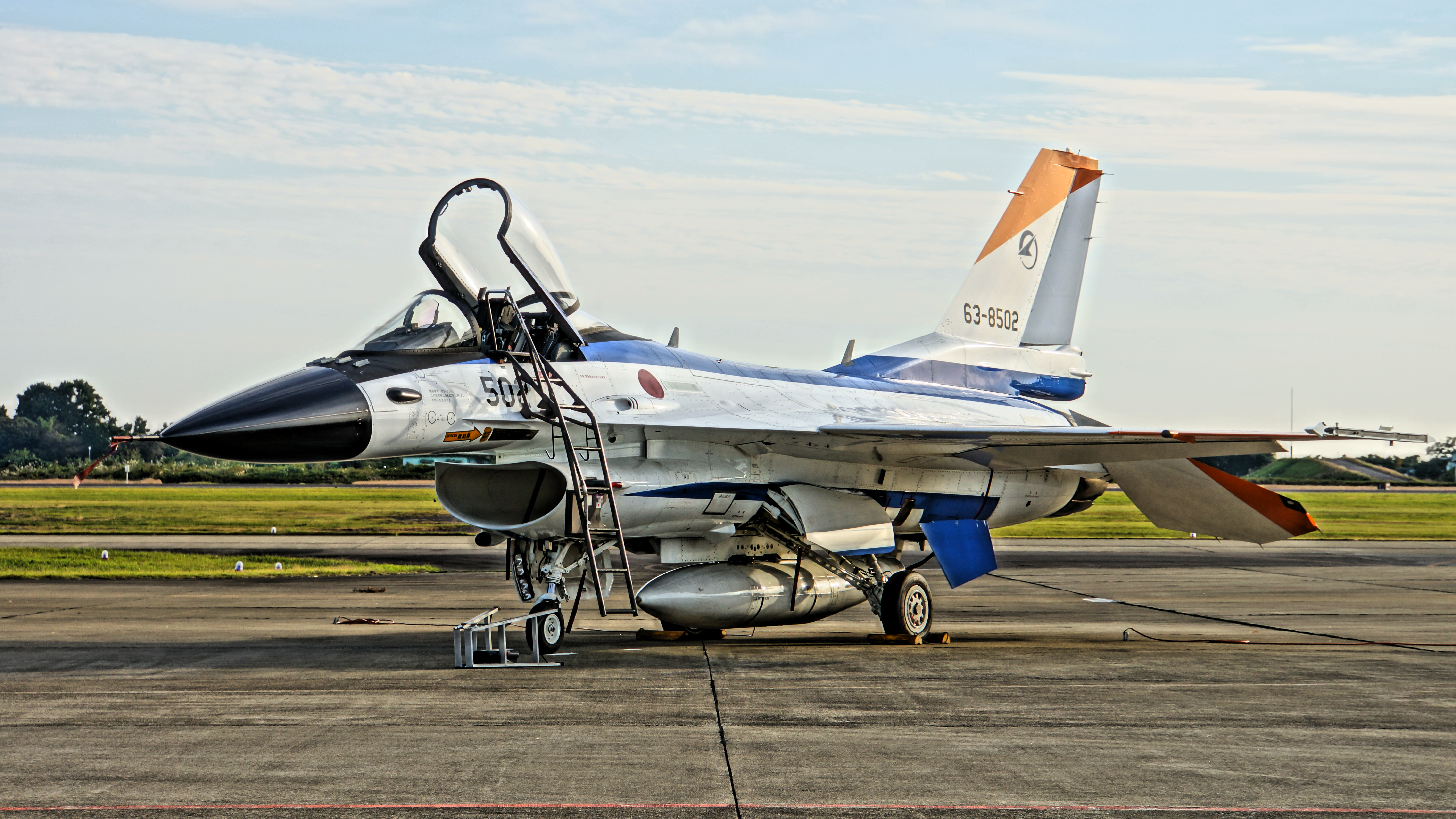 航空自衛隊 F-2A戦闘機（63-8502号機） HDR撮影。2016年10月30日 岐阜基地にて。